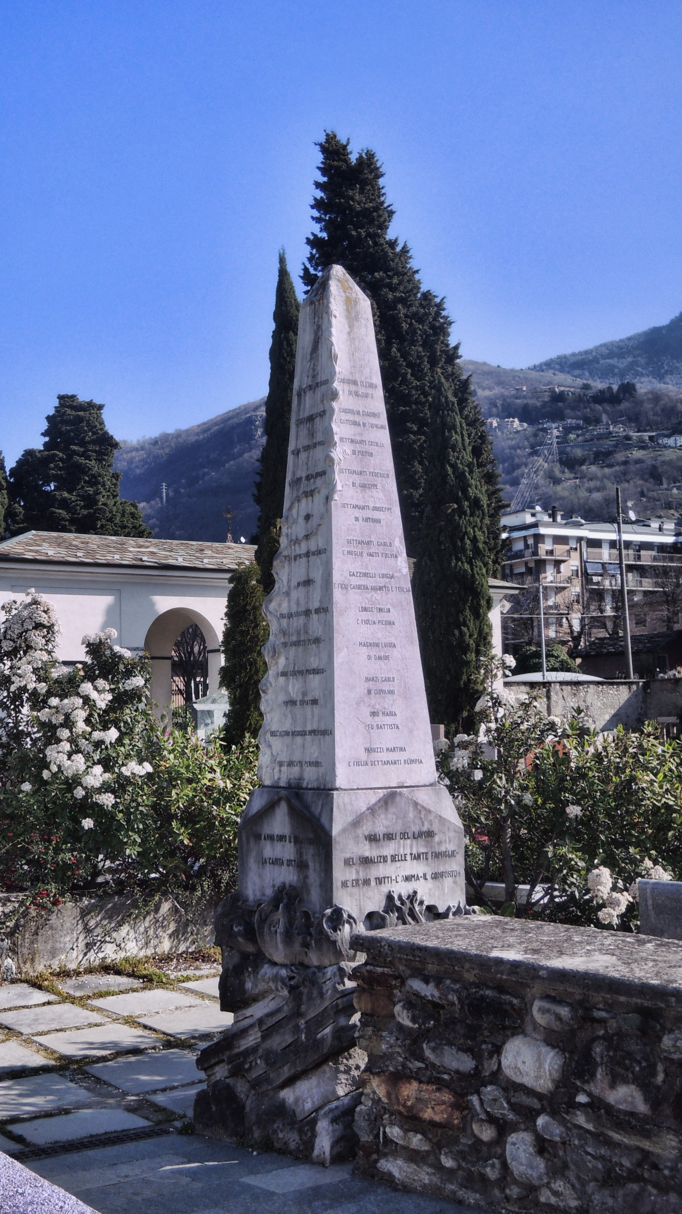 Dervio. Monumento a ricordo delle vittime di un incendio del 1883.